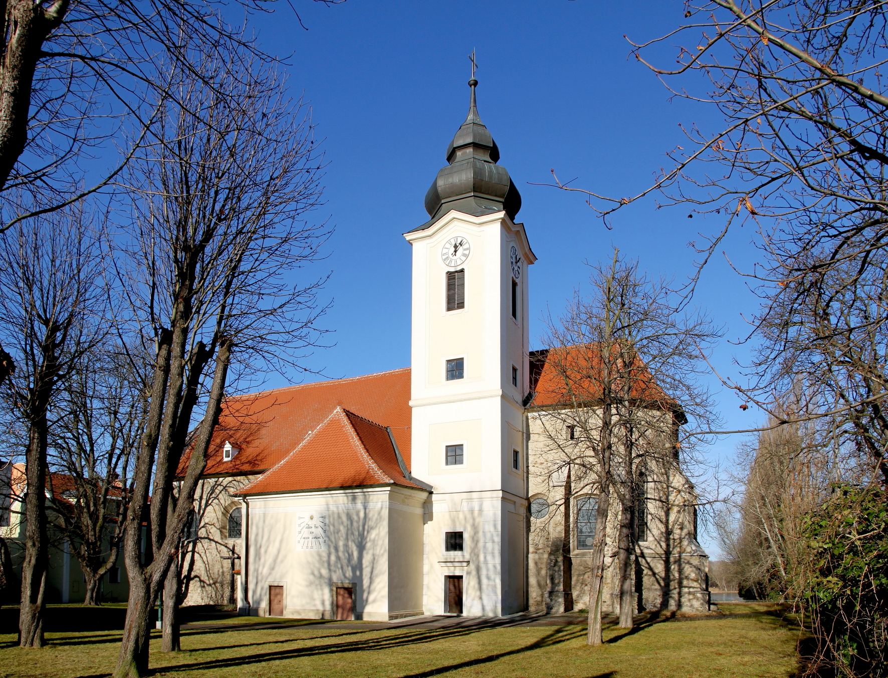 Südostansicht der katholischen Pfarrkirche hl. Stephan in der niederösterreichischen Marktgemeinde Zwentendorf an der Donau.